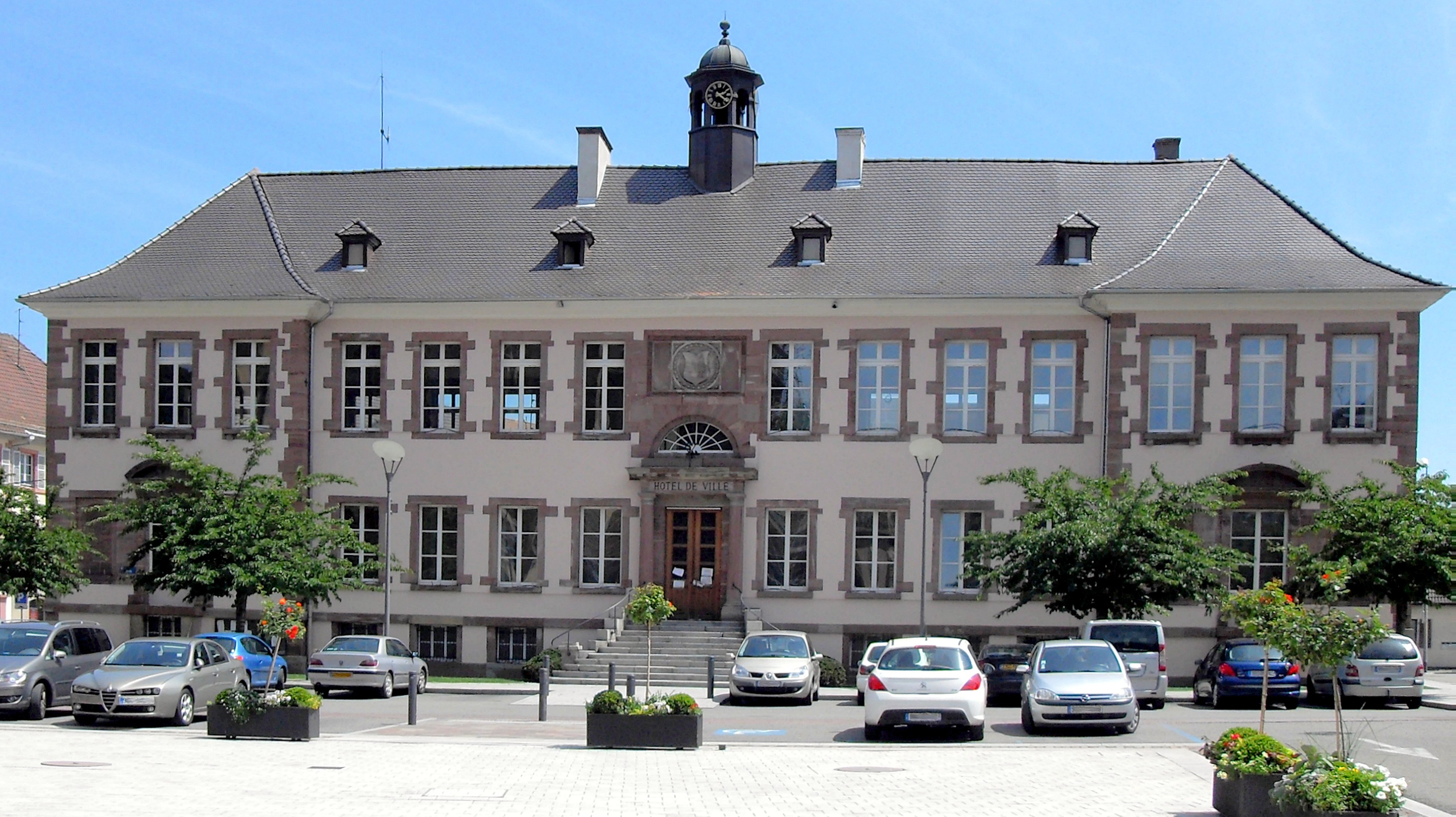 L'hôtel de ville de Thann